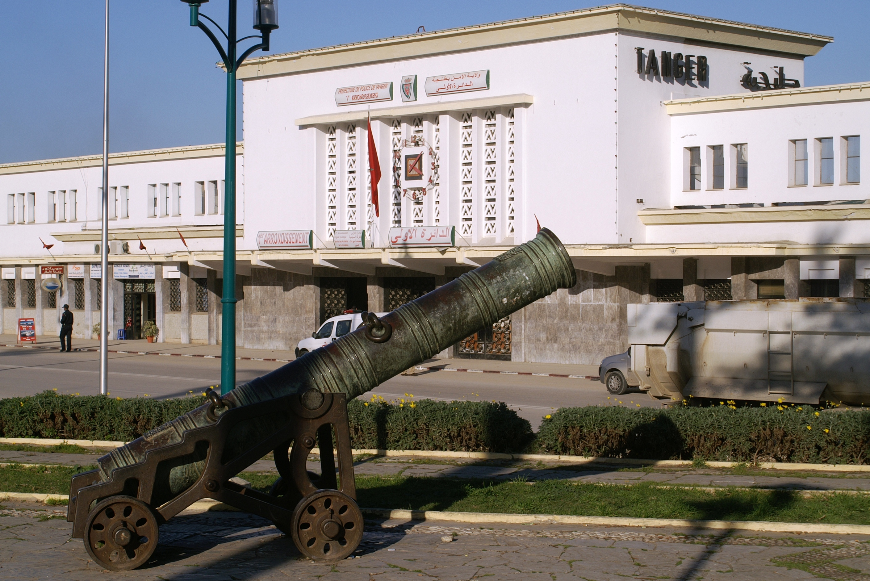 Politiebureau in Tanger (Marokko)